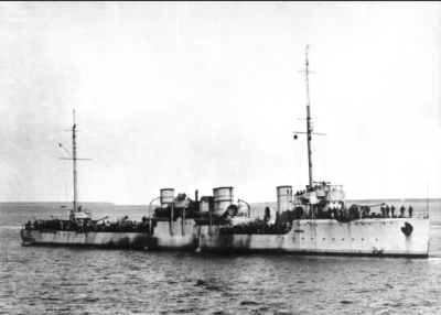 Эсминец «Константин».